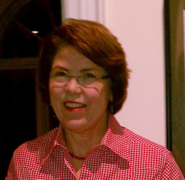 EMU President Susan Martin